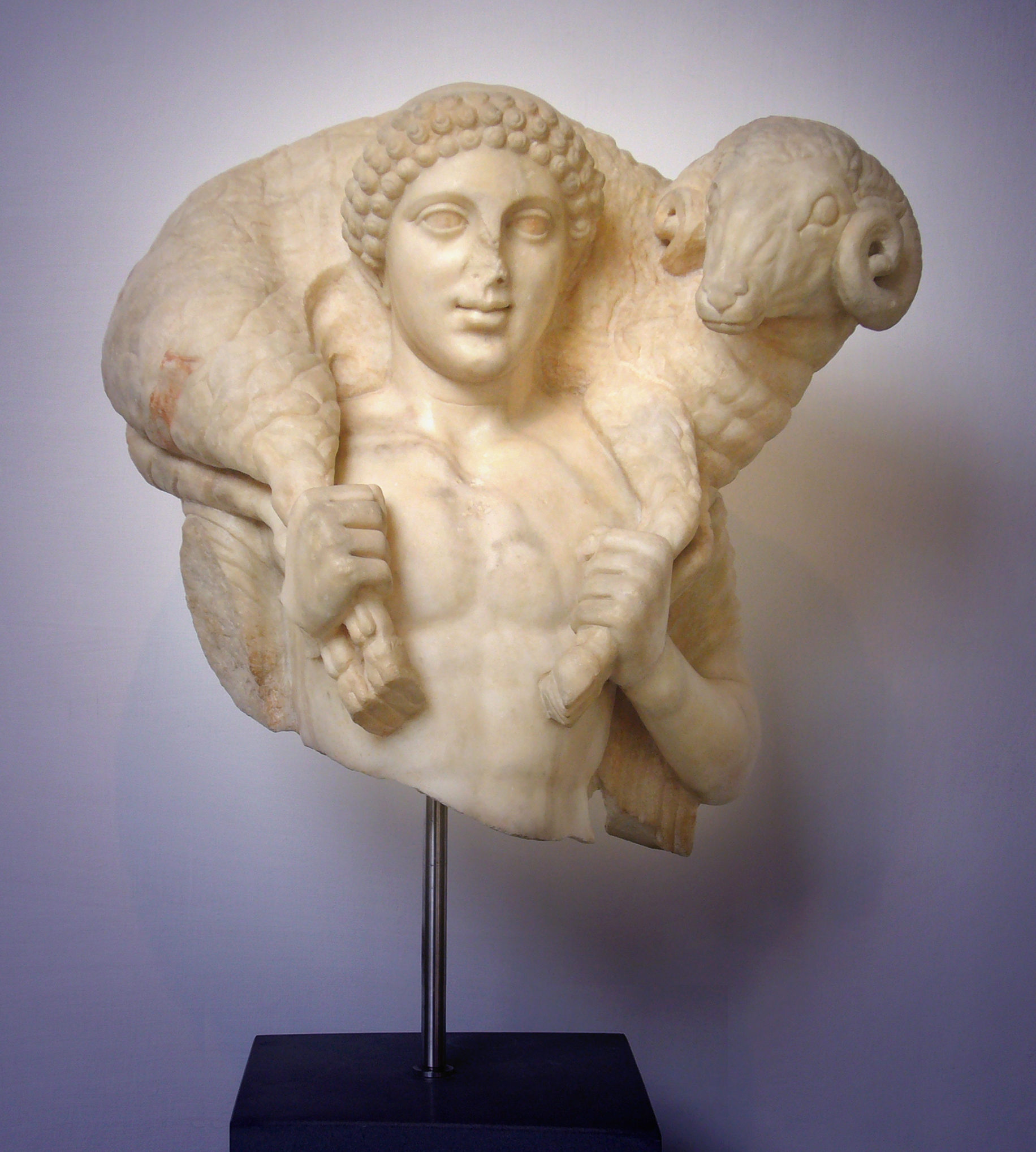 Hermes Kriophoros. Copia tardoromana de original grego do seculo V a.C. Fonte:File:Museo Barracco - Ermes Krioforos V 1010658.JPG